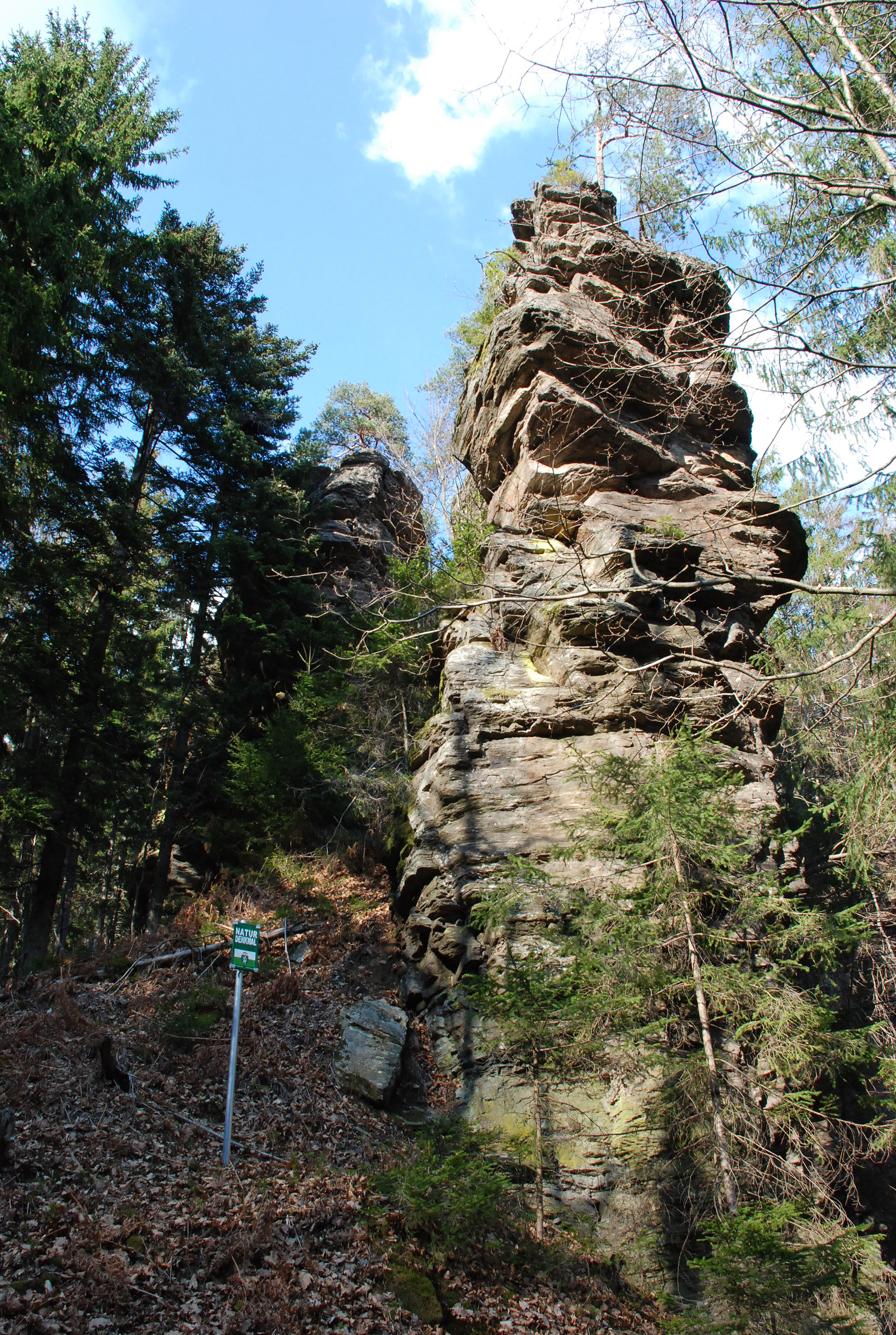 Mannagetta-Ofen und seine Umgebung im Mausegger Graben, Gemeinde Marhof, Steiermark, Österreich